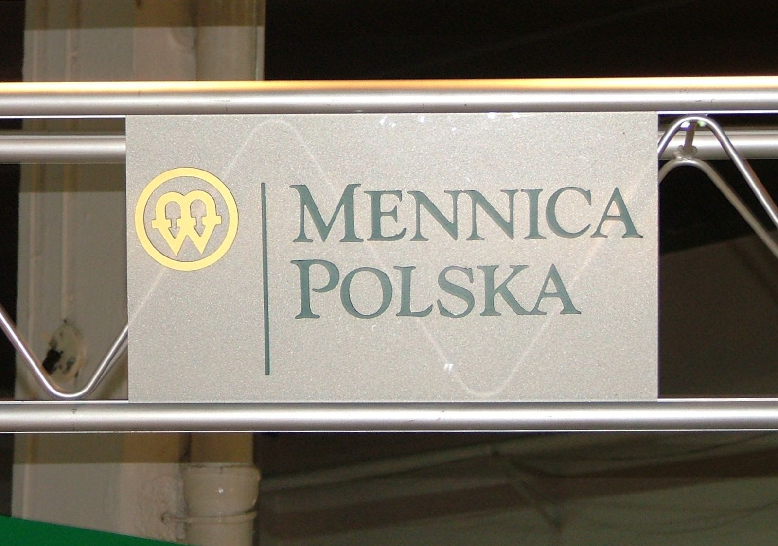 Polska, Kielce, V Międzynarodowe Targi Lokalnego Transportu Zbiorowego TRANSEXPO, 19-21 IX 2007